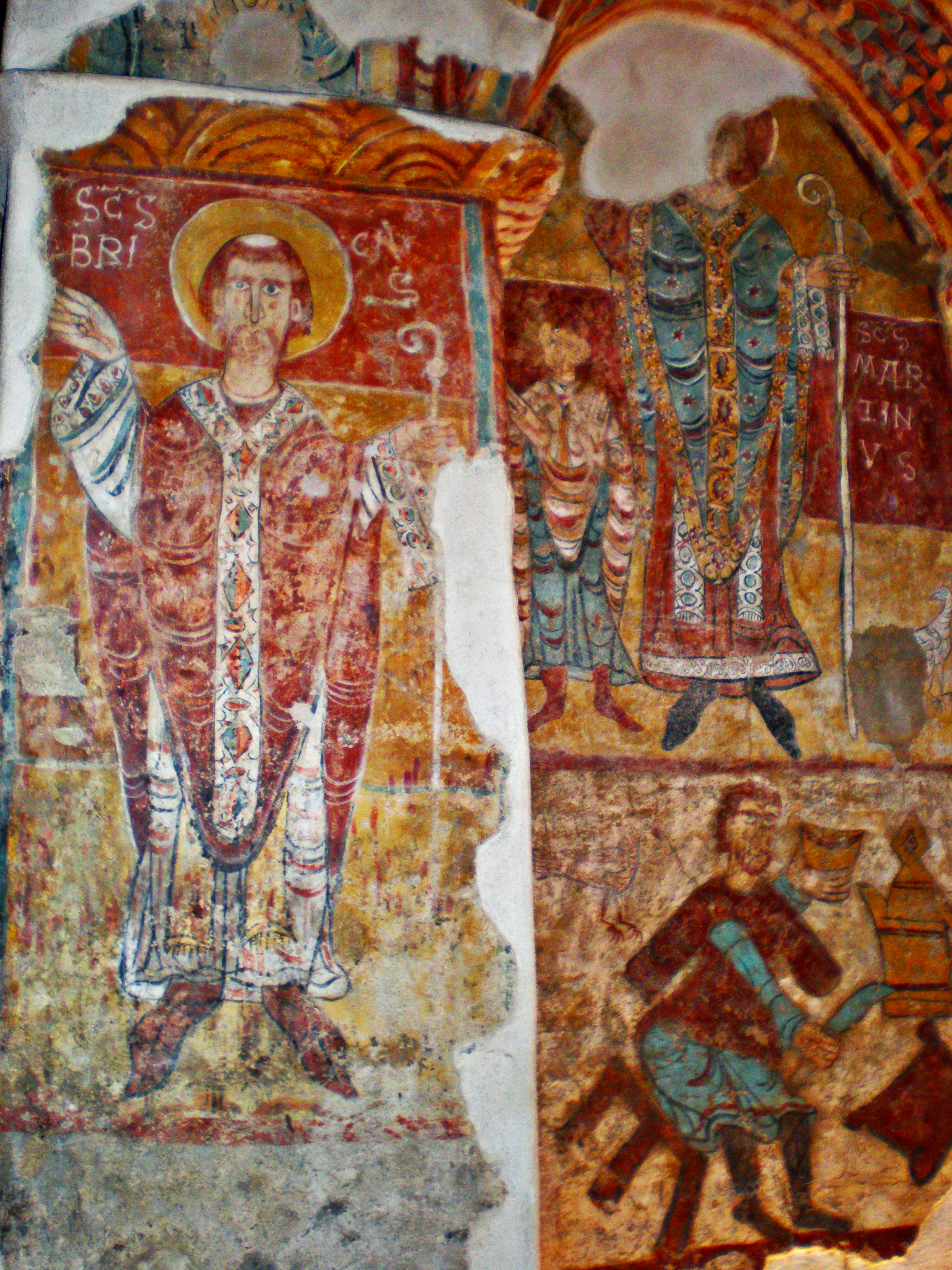 Església de Sant Martí de la Cortinada